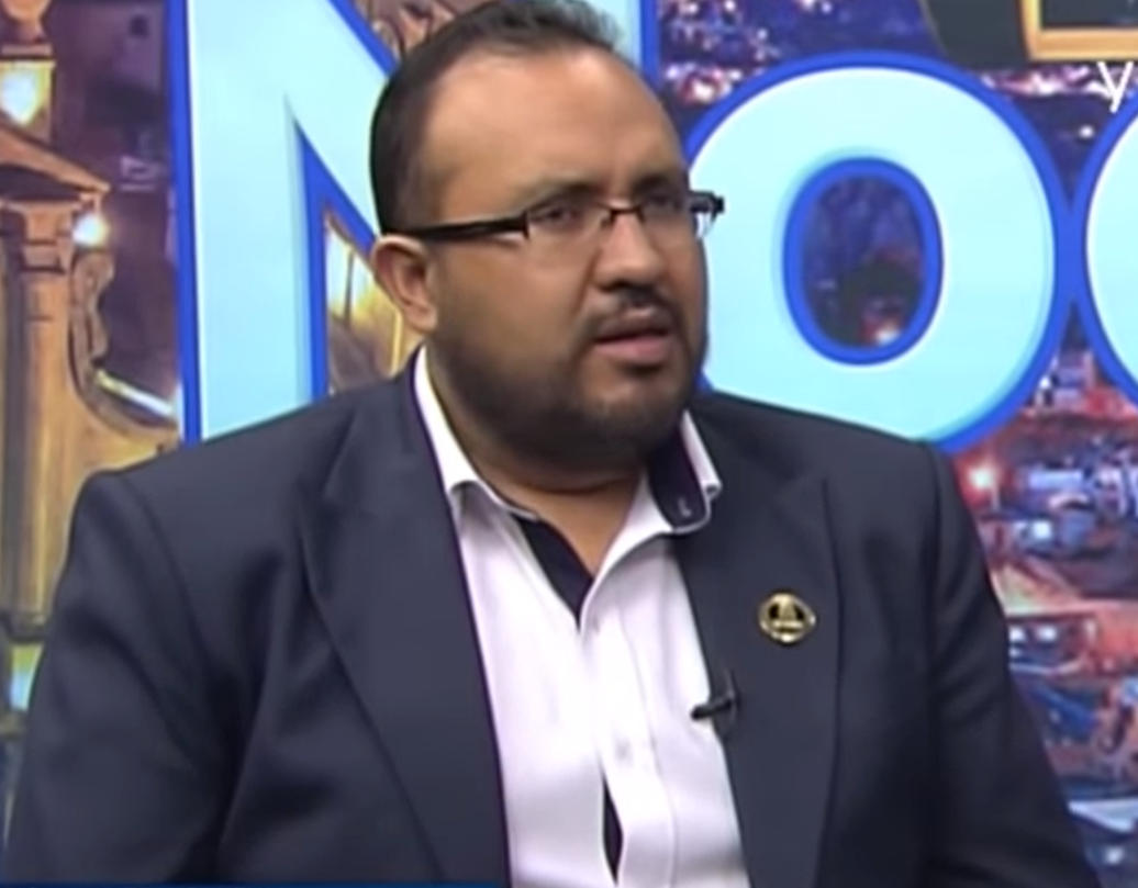 Ministro Milton Claros en 2018